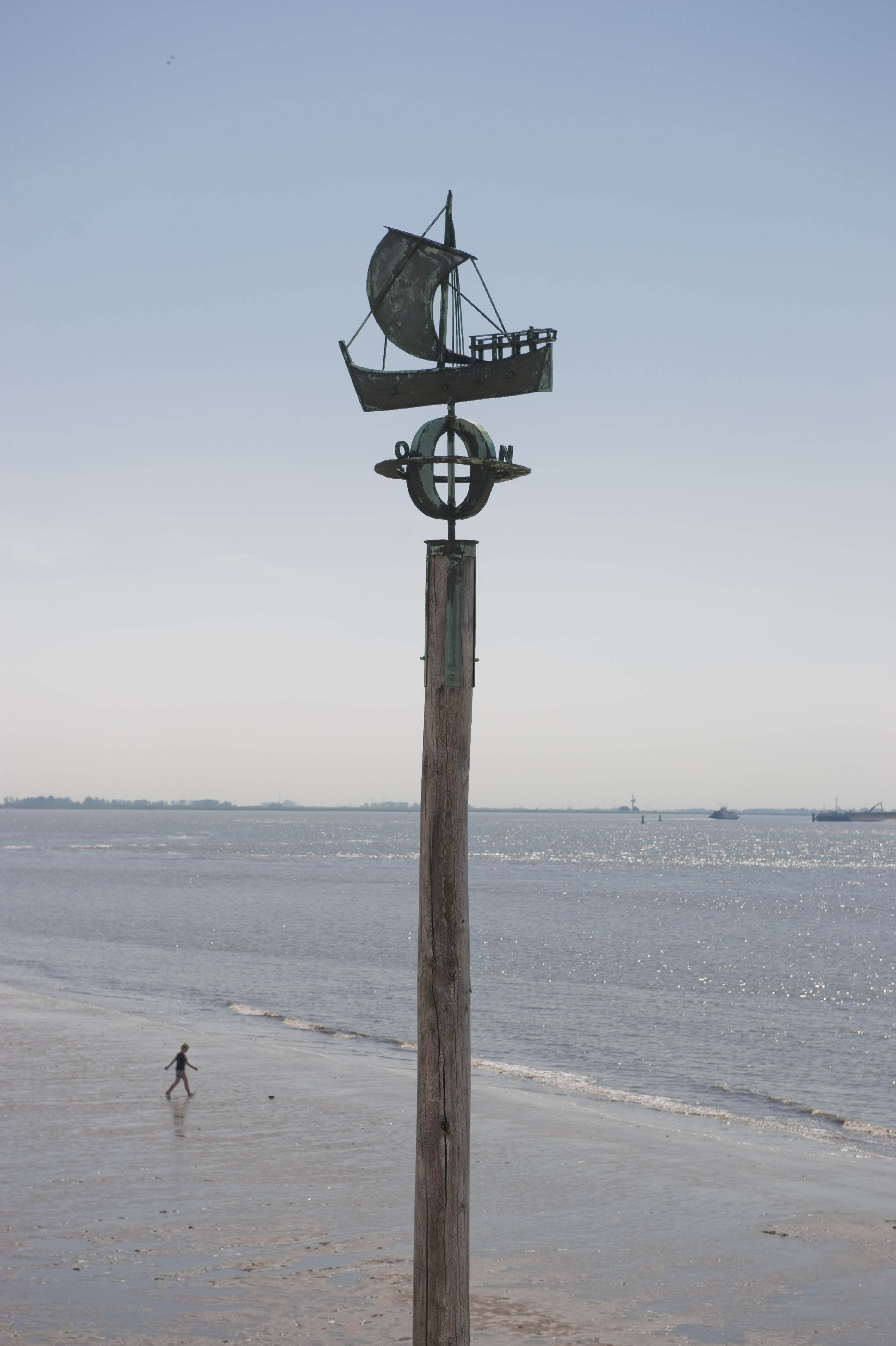 Sculpture by Gerhard Olbrich at the river Weser, Bremerhaven, Germany Sturmflutsäule, 9 m hoch, aufgestellt 1975 vom Kuratorium des Deutschen Schiffahrtsmuseum zur Erinnerung an Sturmflutgefahren wasserwärts des Deiches am DSM. Am Pfahl befinden sich Kupferringe, die die Höchstwasserstände von Sturmfluten anzeigen (1717, 1825, 1906, 1936, 1962, 1973). Auf der Spitze befindet sich ein in Kupfer gearbeitetes Modell der Bremer Hansekogge über eine Weltkugel, drehbar im Wind. Das Model wurde vom Bremerhavener Bildhauer Gerhard Olbrich geschaffen. Mit der Deicherhöhung 2011 wurde die Säule abgebaut und Ringe und Kogge im Archiv des DSM eingelagert.